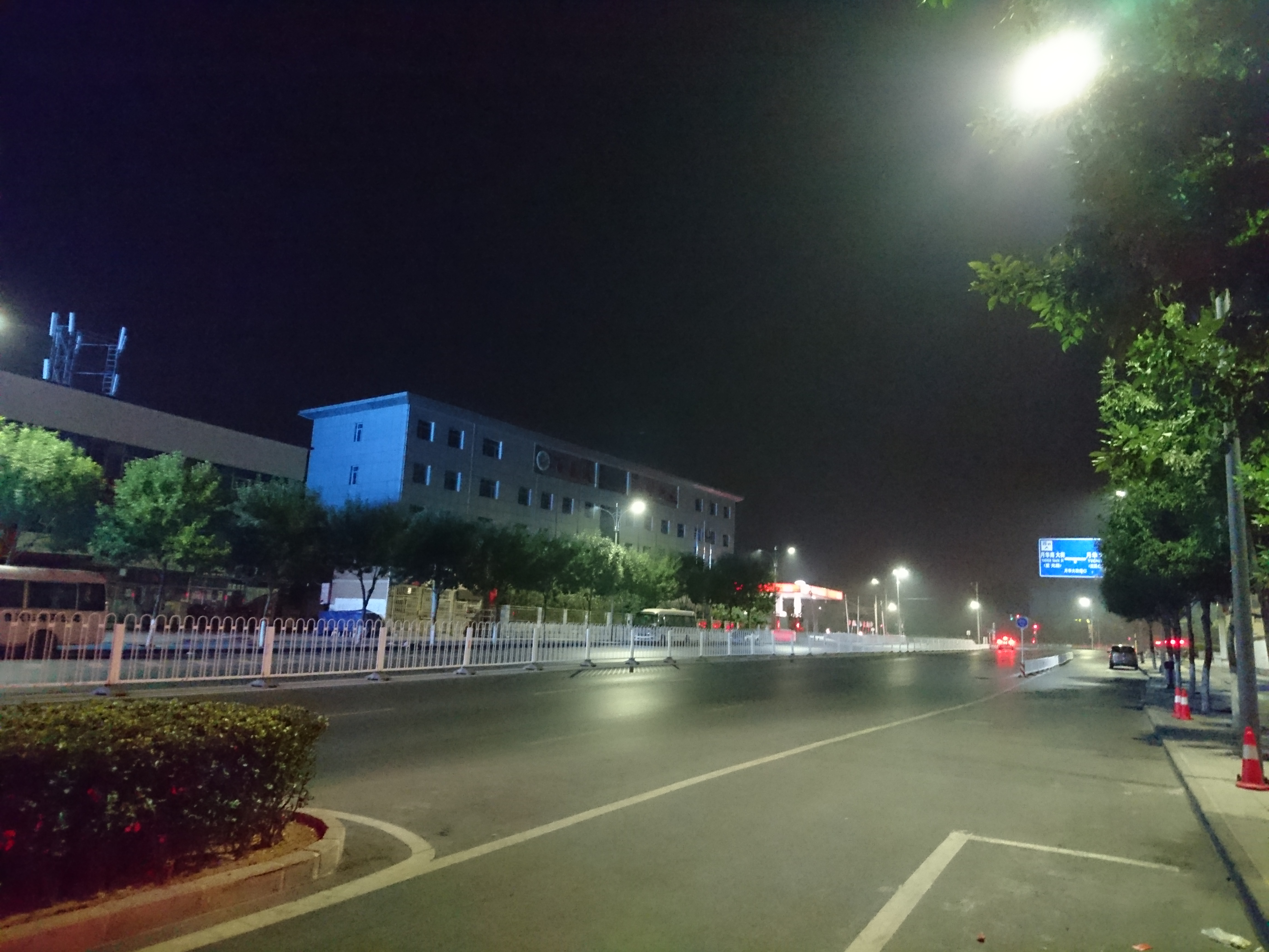 良郷西路